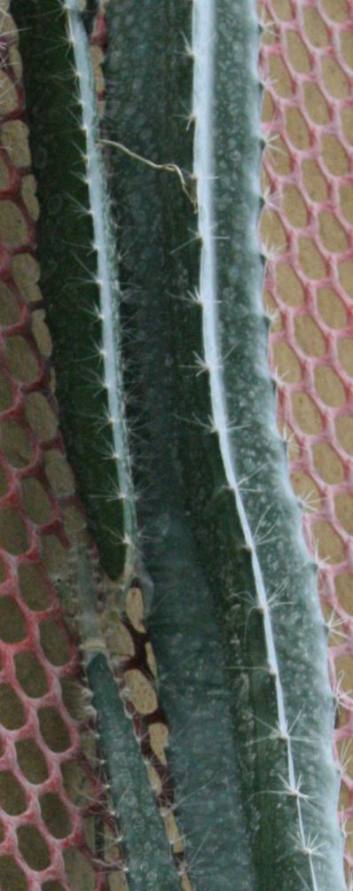 Hylocereus monacanthus (Hylocereeae; Cactaceae; Planta) kaktusz hajtása